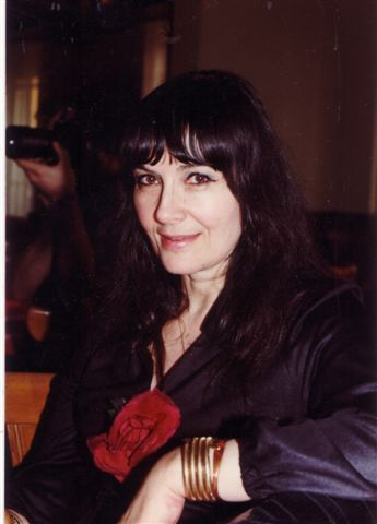 dans un bistrot à genève